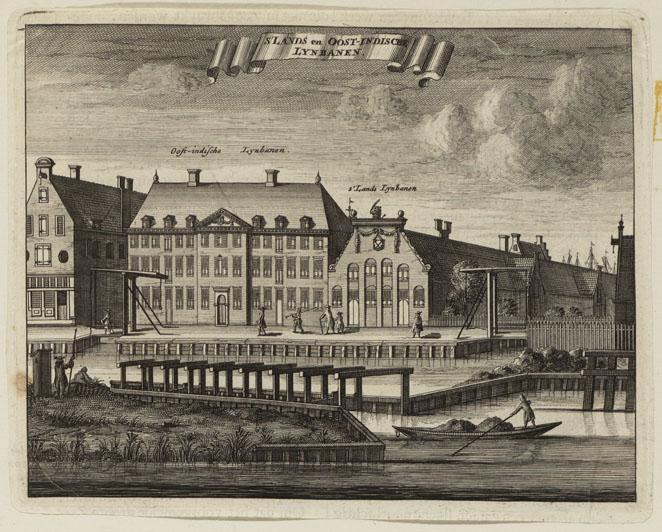 Kopergravure met voorstelling van een lijnbaan in Amsterdam.